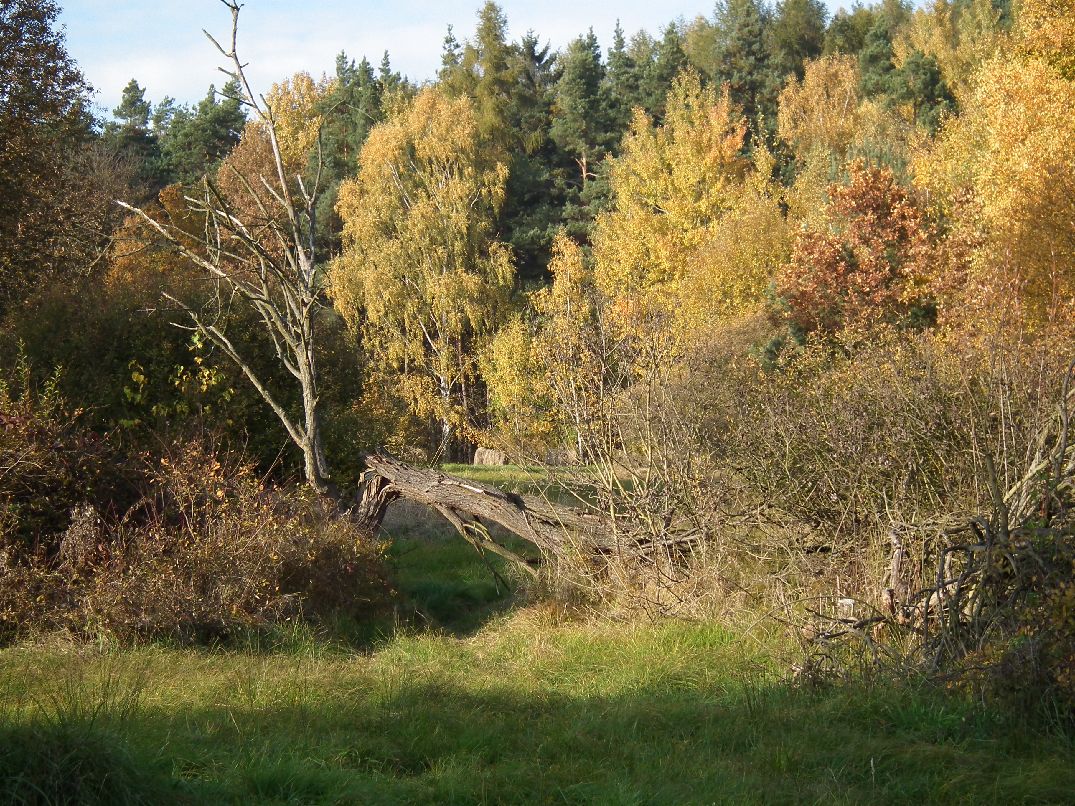 jižní pohled na studánky